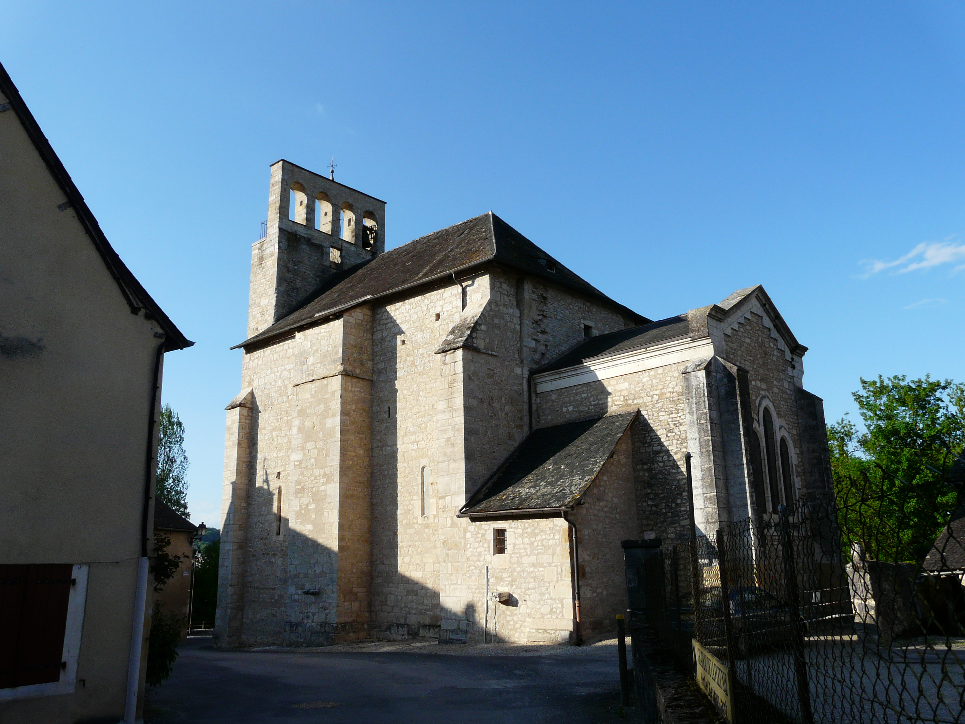 L'église Notre-Dame et Saint-Jean-Baptiste, Condat-sur-Vézère, Dordogne, France.